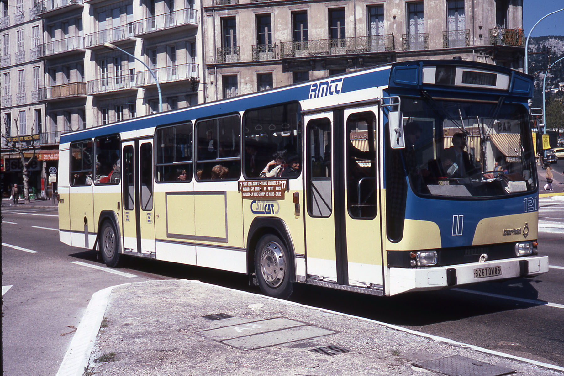 Un Berliet PR100 B de la RMTT à Toulon en 1980